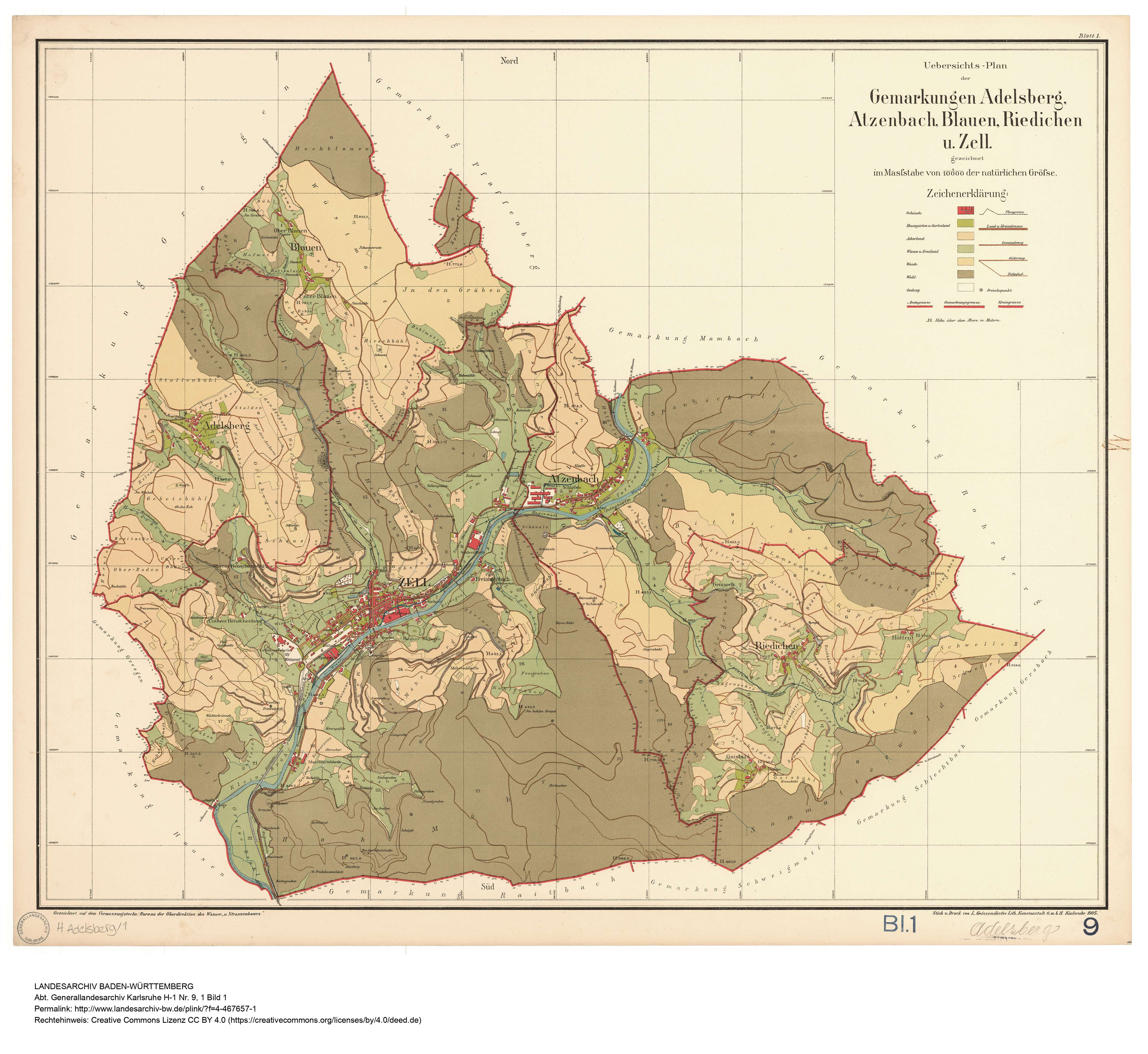 Karte von Adelsberg (Stand 1902), Atzenbach (Stand 1901), Blauen (Stand 1902), Riedichen (Stand 1904) und Zell im Wiesental (Stand 1903), Druck: 1905